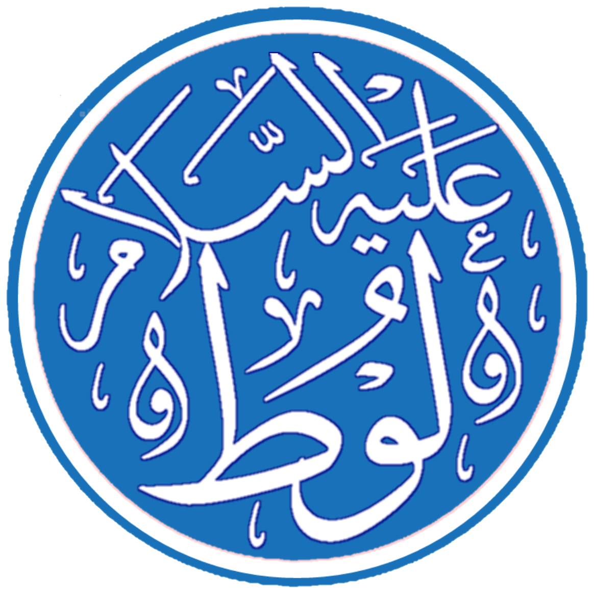 لوط علیہ السلام